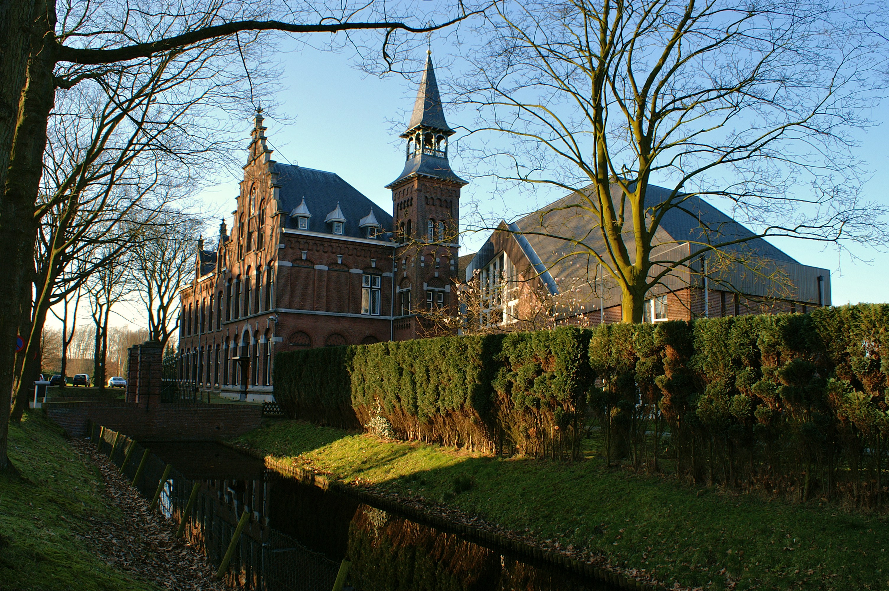 Het voormalige kasteel Nieuwenhof, thans het St. Stanislausklooster te Moergestel.